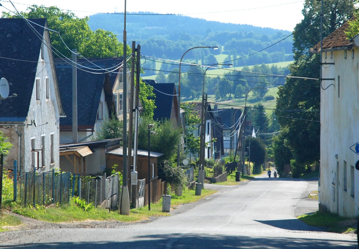 Lesná